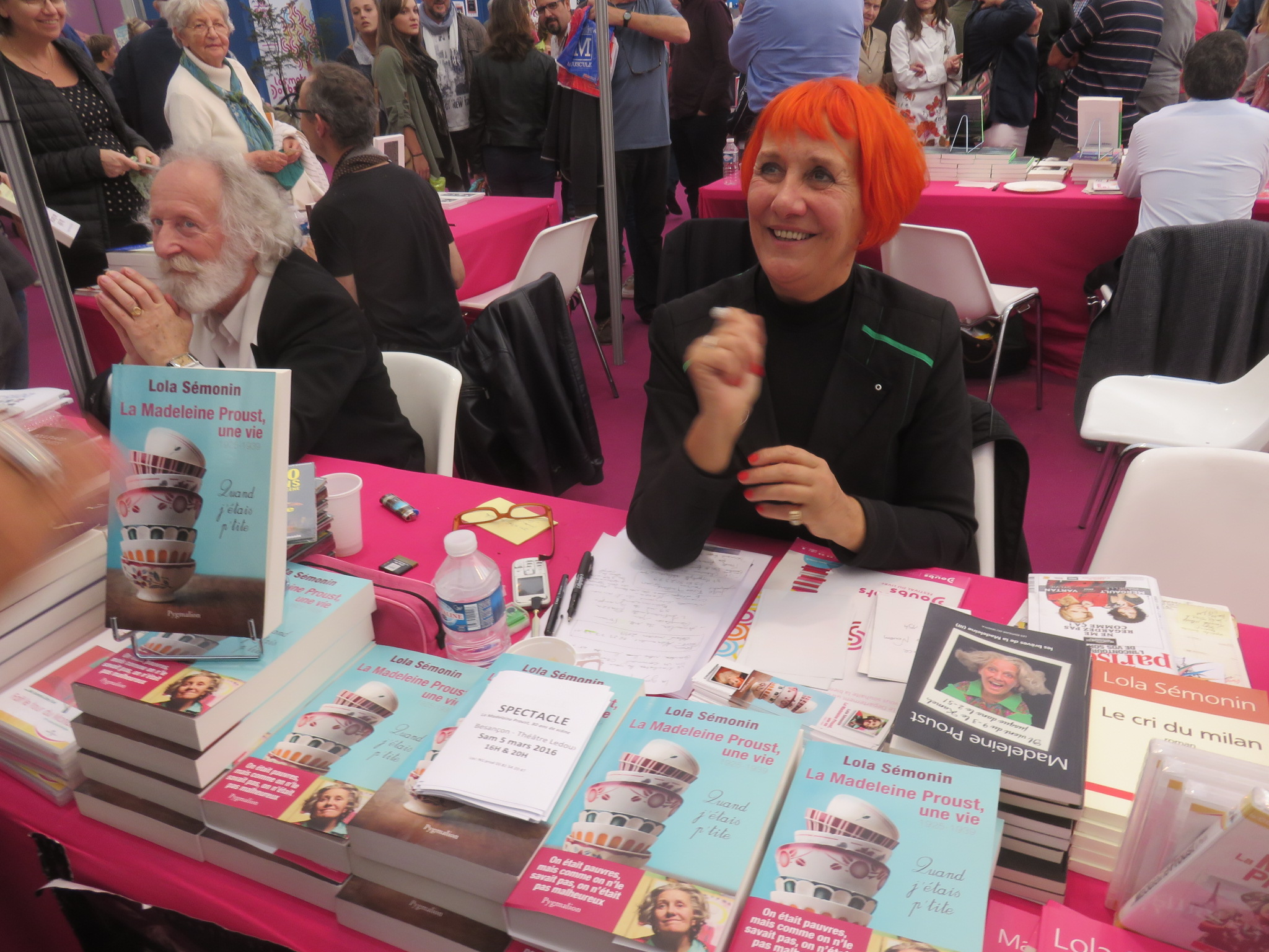 La comédienne Laurence Sémonin, lors d'une séance de vente et dédicace de ses livres et de son spectacle, au salon du livre " les mots Doubs " de Besançon en 2015